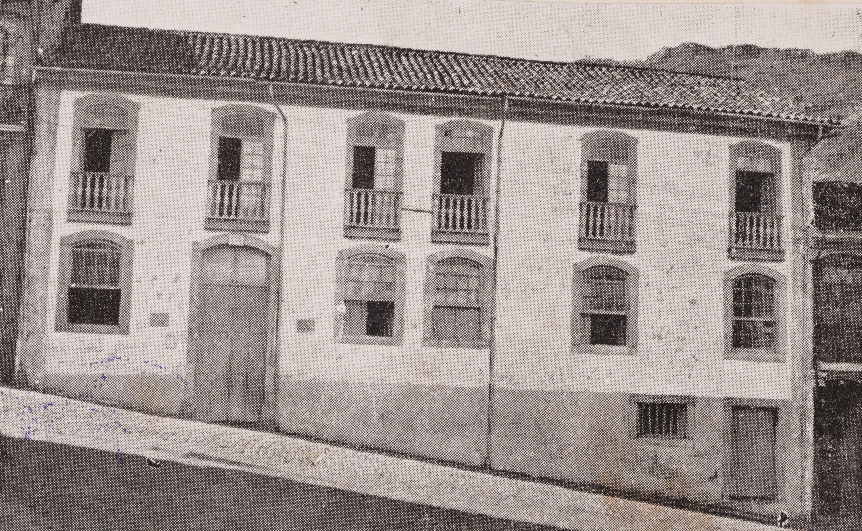 Obra que integra o acervo do Museu Paulista da USP. Coleção João Baptista de Campos Aguirra.